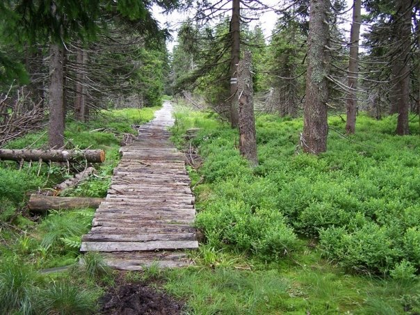 Neznačená cesta mezi Velkou a Malou Jezernou v rozsoše Mravenečníku.